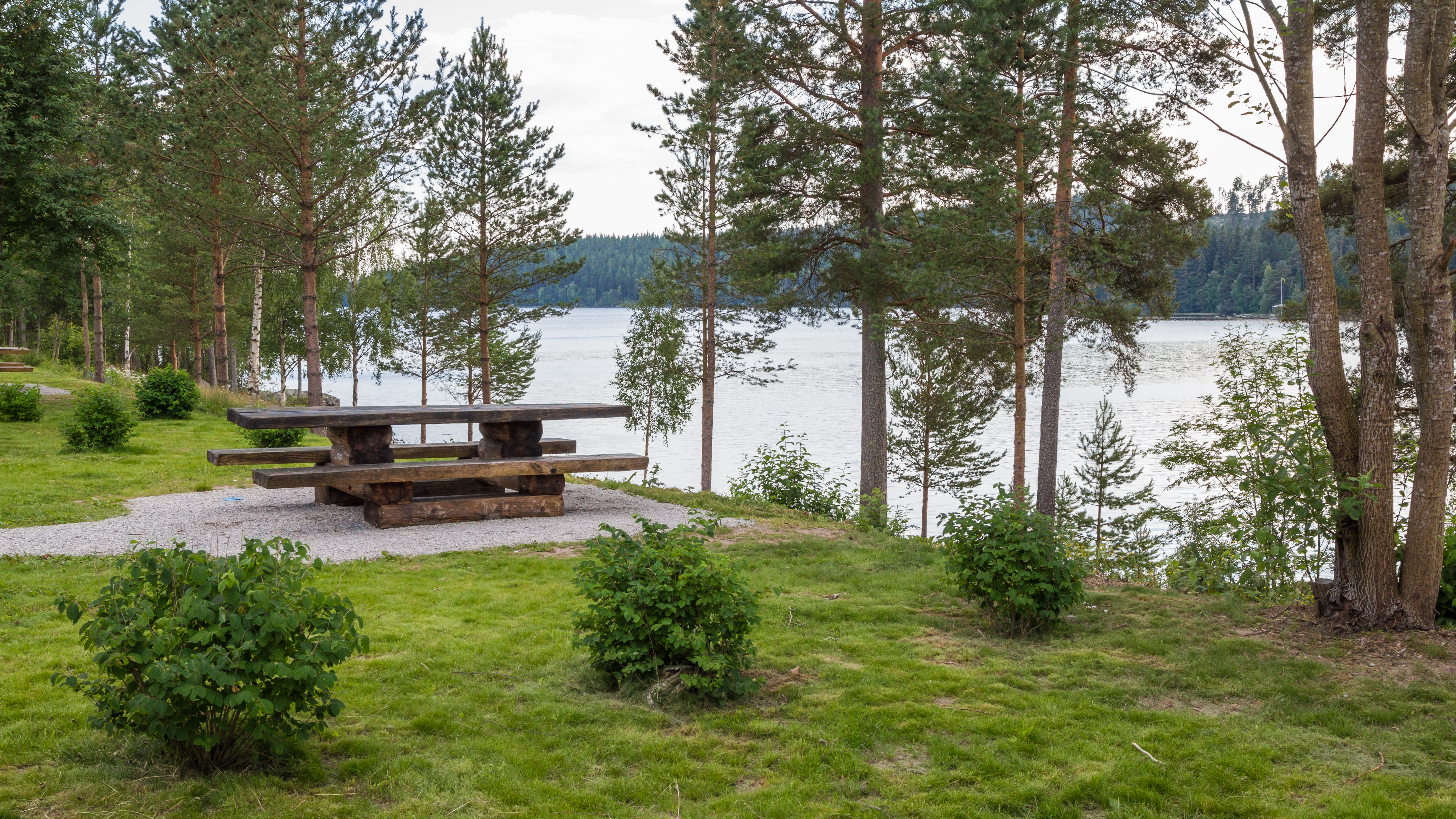 Rastplatsen vid Rällsjön, Dalarna, Sverige